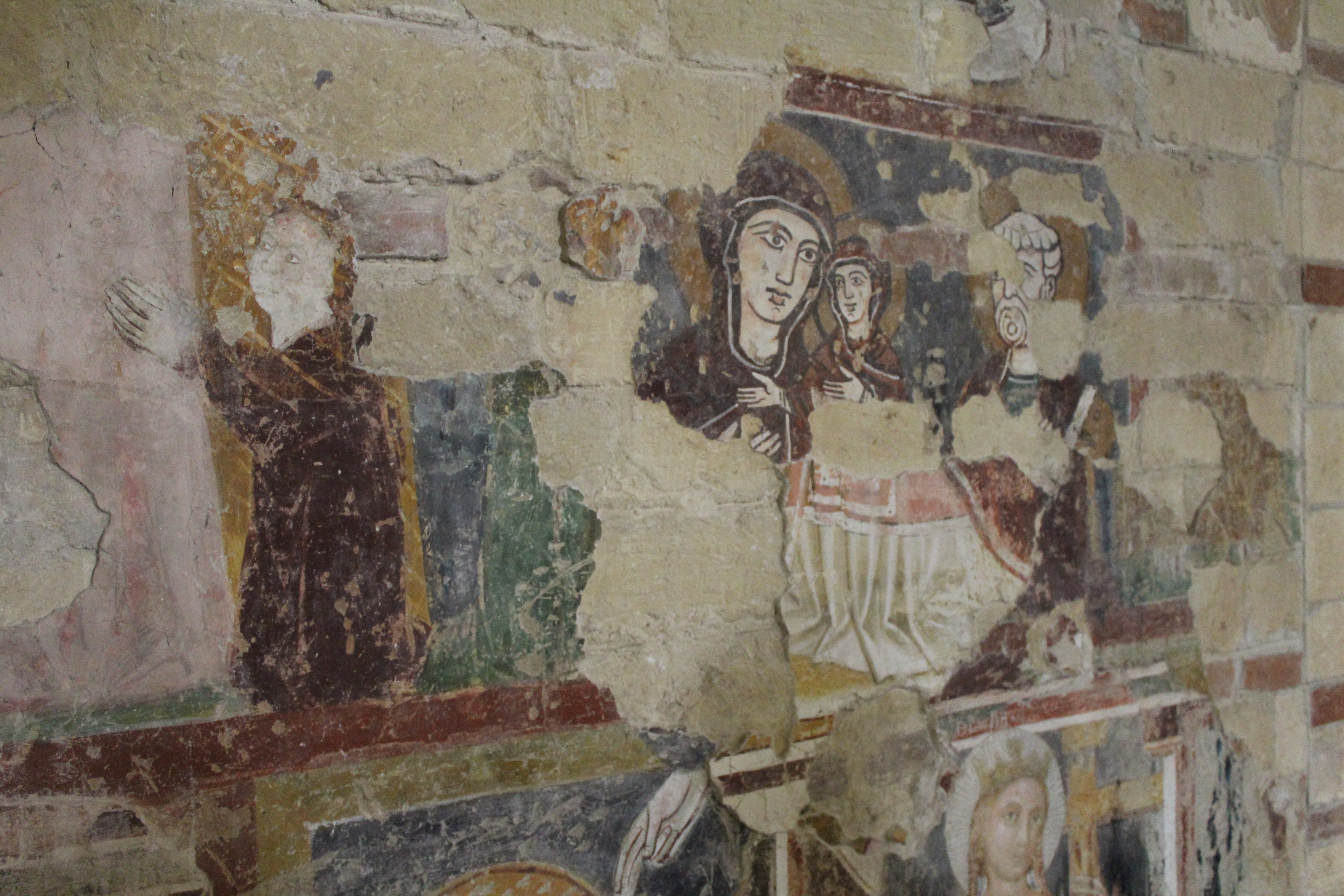 Chiesa di San Giovanni in Valle a Verona. Interno.